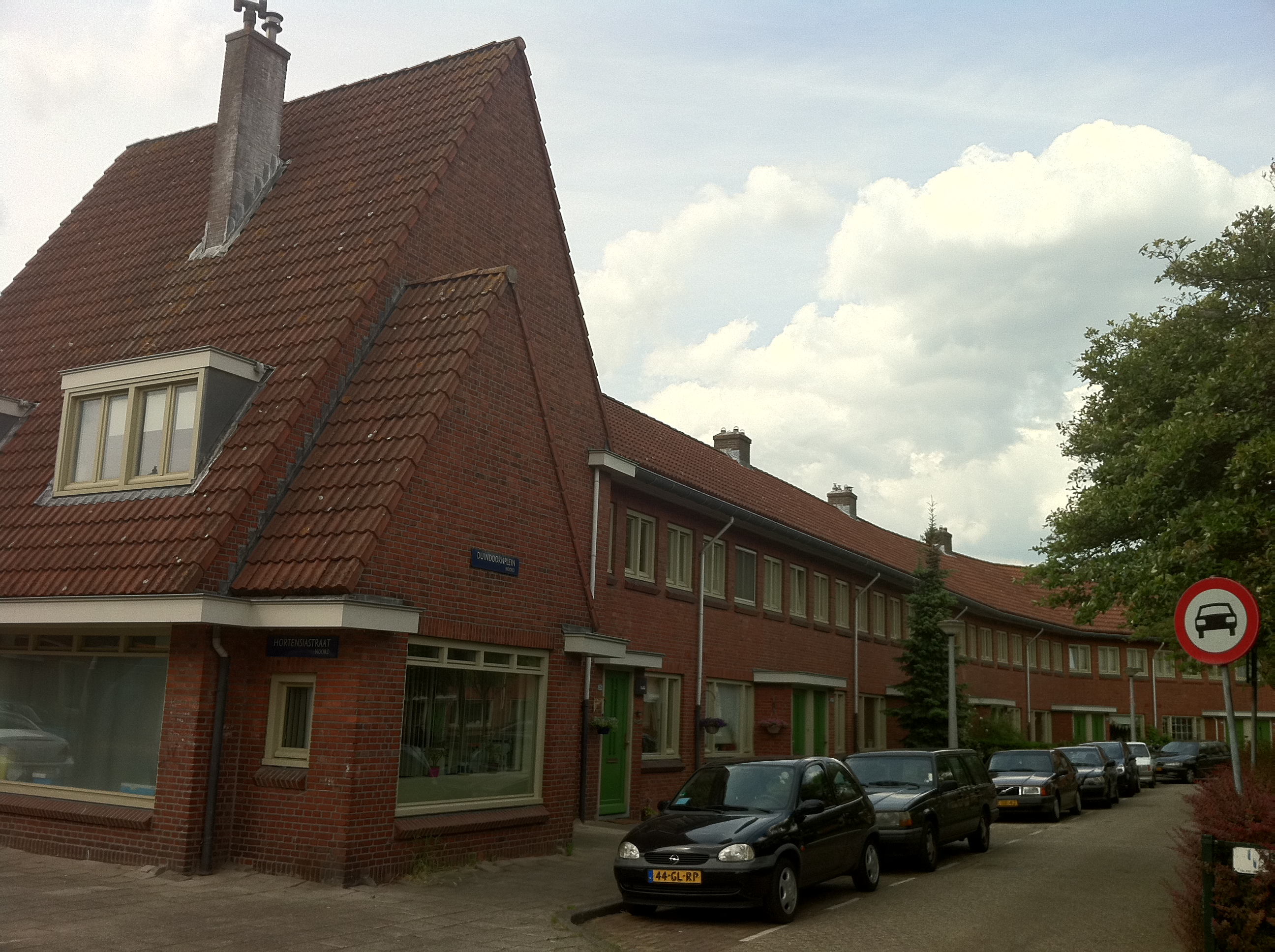 Amsterdam-Noord, Hoek Duindoornplein / Hortensiastraat (Latherusbuurt, onderdeel van Bloemenbuurt). Van Karel J. (Dick) Greiner (1891-1964) is het gedeelte van de Latherusbuurt tussen de Azaleastraat, Latherusstraat, Ribesstraat en Hazelaarstraat, rondom het Duindoornplein (1931).